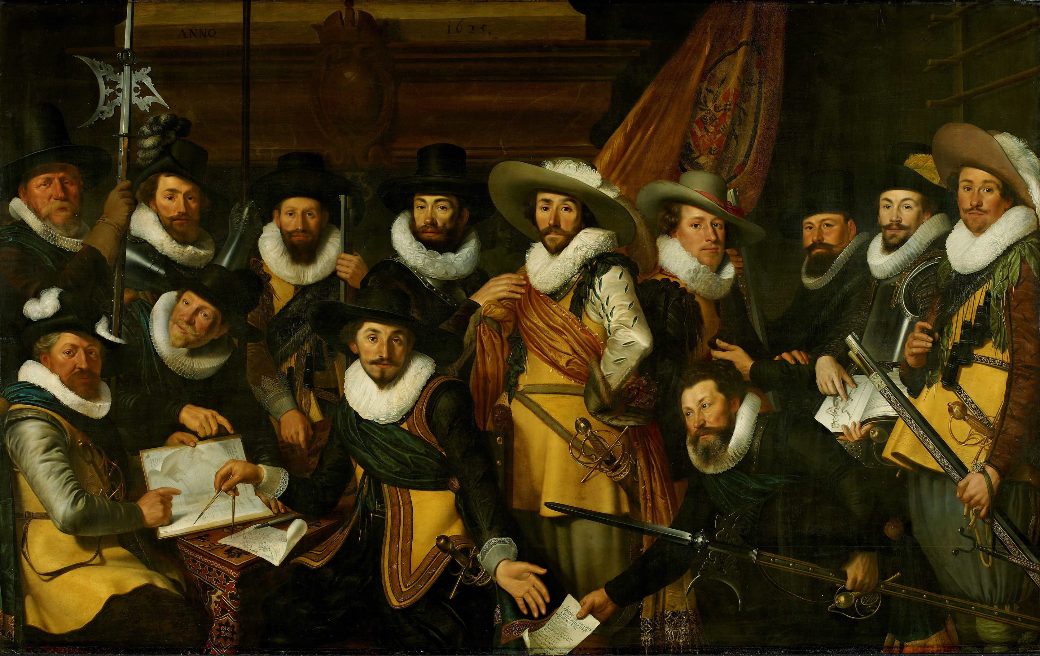 schilderij; Voetboogdoelen; portret; groepsportret; schuttersstuk; Adriaensz., Joris; Burgh, Albert Coenraedsz.; Hulft, Pieter Evertsz.; Buyl, Arent Willemsz. van; Chanu, Jan van; Rendorp, Harmen; Jacobsz., Rombout; Jacobsz., Lucas; Hoorn, Herman Cornelisz. van; Strijen, Nicolaes van; Croon de Jonge, Jacob Jacobsz.; Croon, Pieter Jacobsz.; Simonsz., Pieter